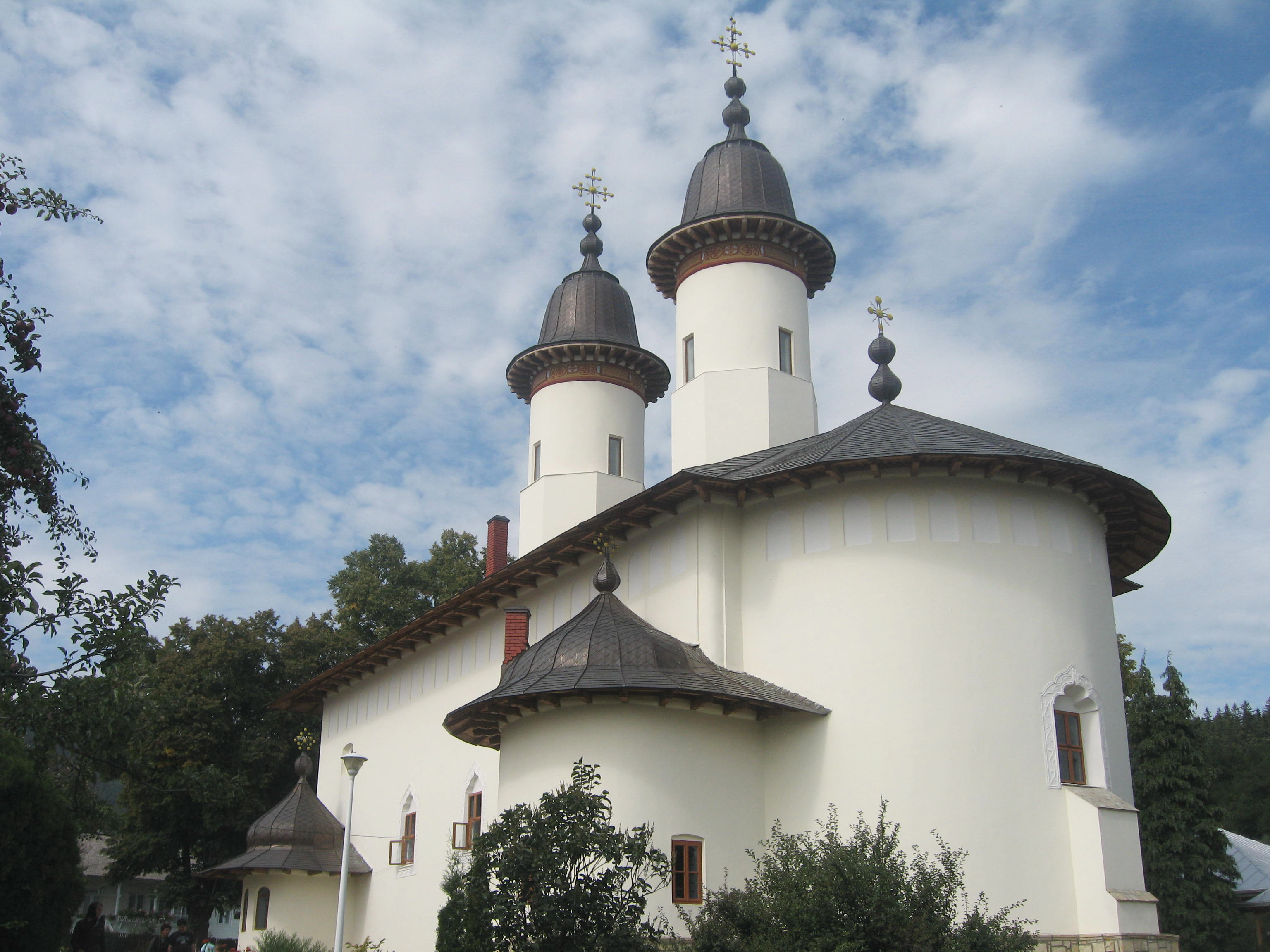 Mănăstirea Văratec